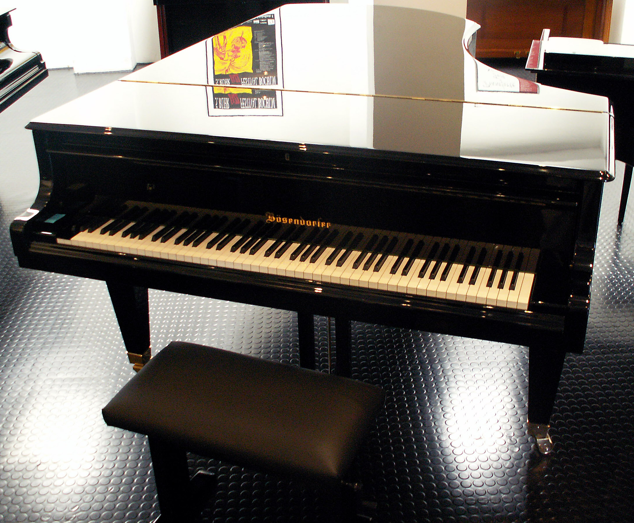 Fortepian marki Bösendorfer.